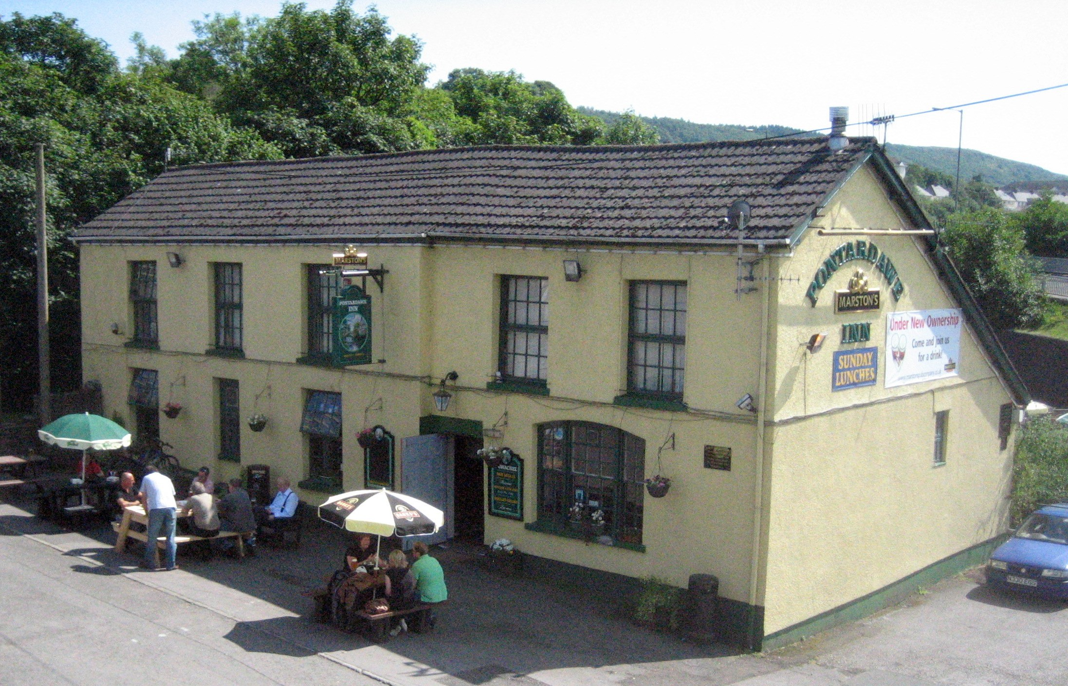 Pontardawe Inn, Pontardawe, Wales